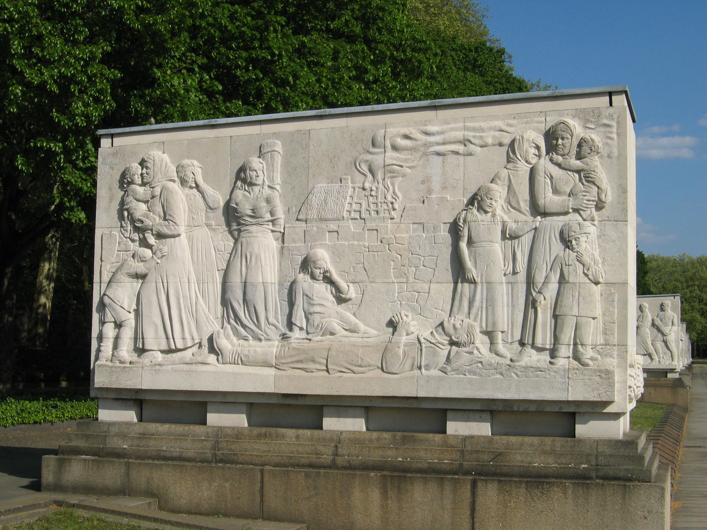 Berlin Treptow Sowjetisches Ehrenmal Seitenskulptur